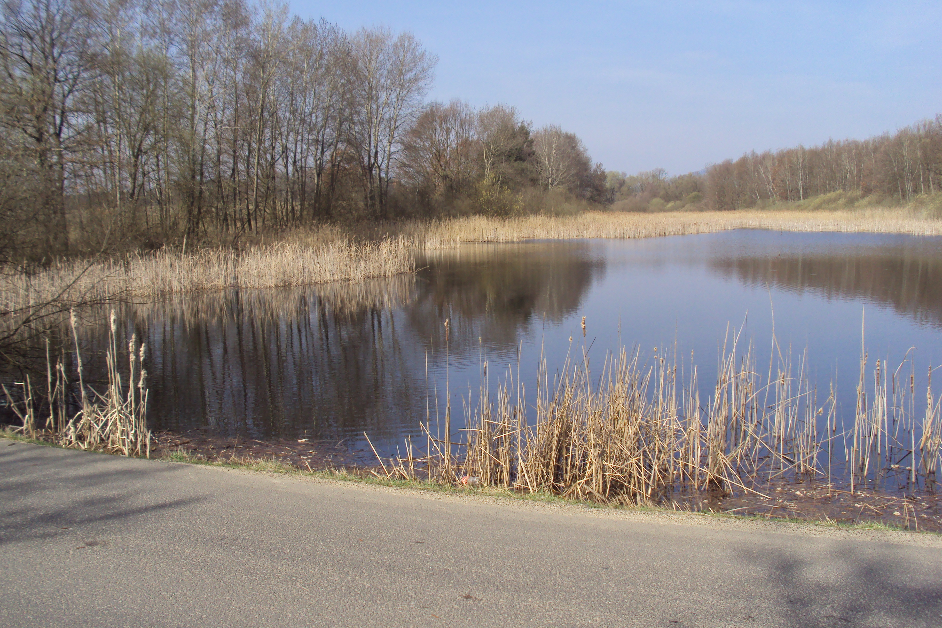 Rybník je u silnice Holany-Zahrádky, katastr Holany 640735